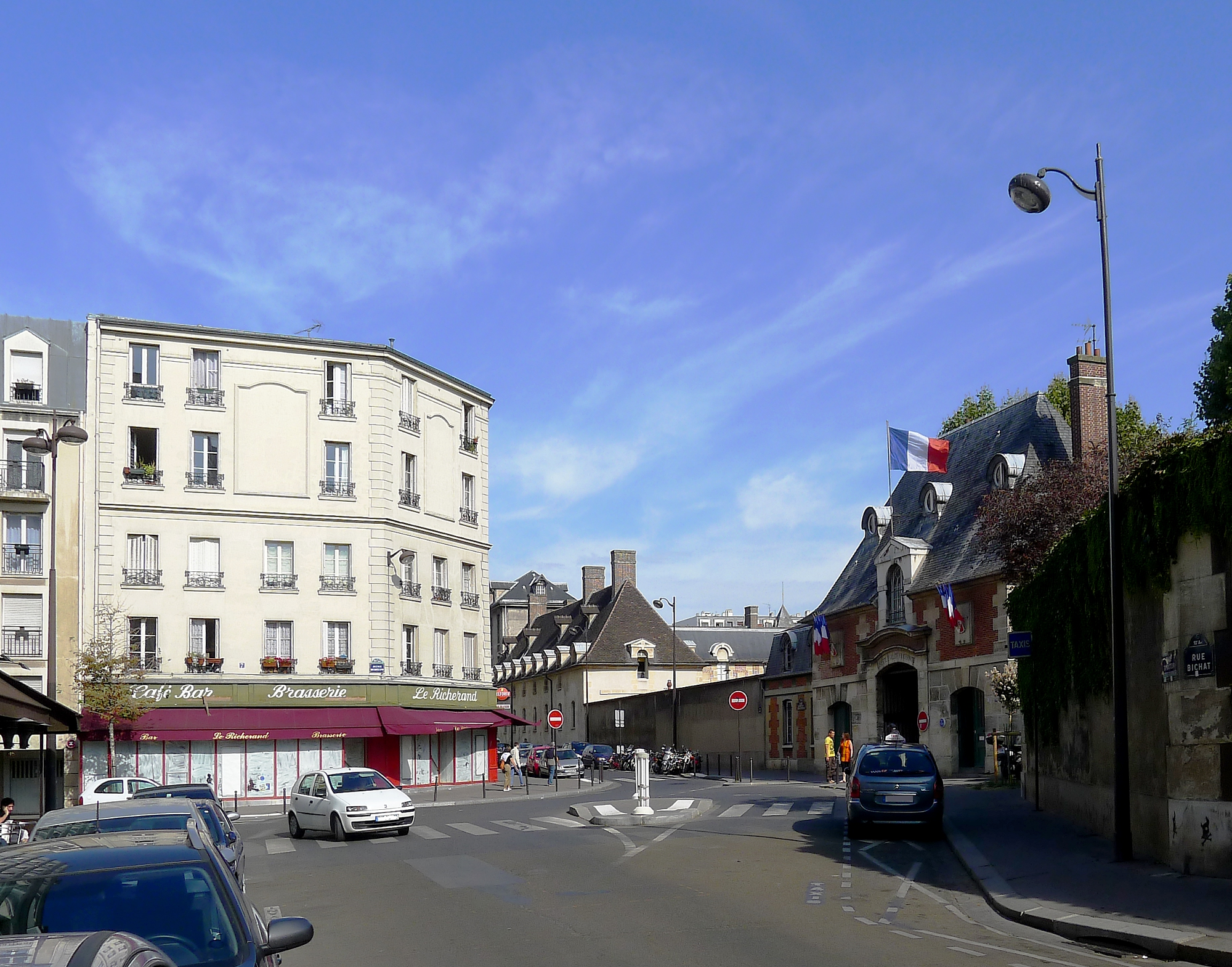 Place du Docteur-Alfred-Fournier - Paris X